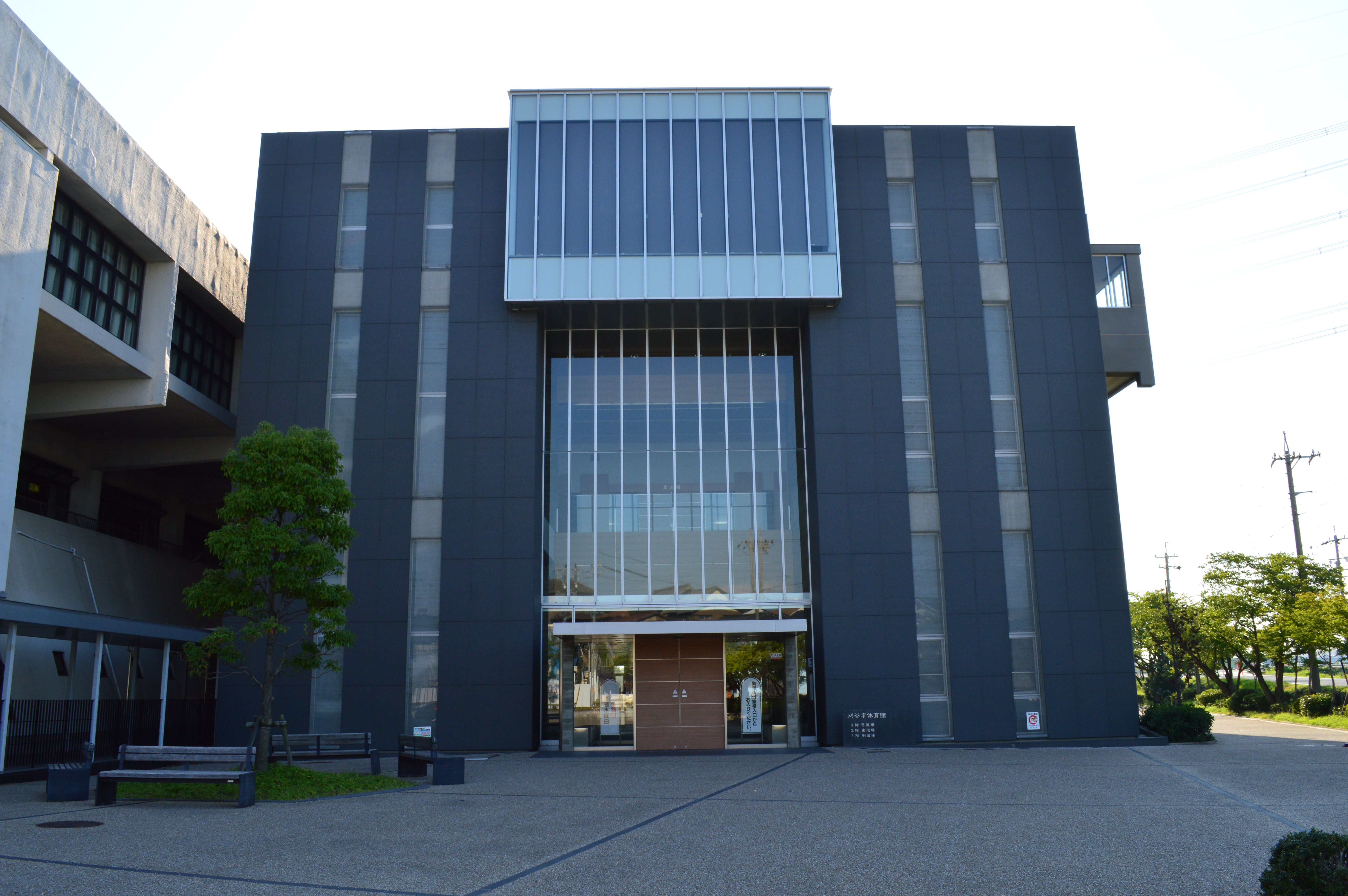 愛知県刈谷市逢妻町にある刈谷市体育館に隣接している武道場